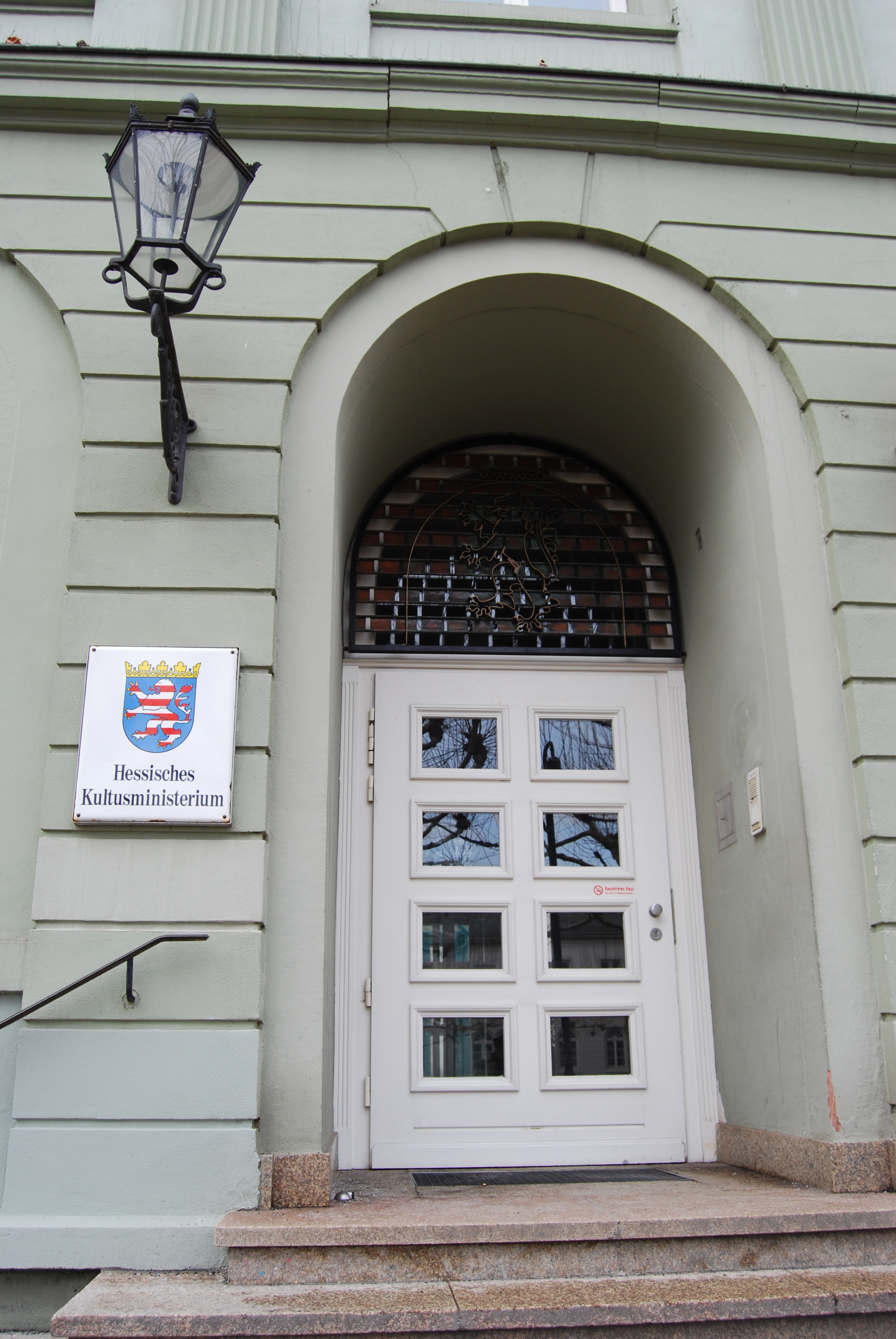 Der Eingang des Hessischen Kultusministeriums in Wiesbaden